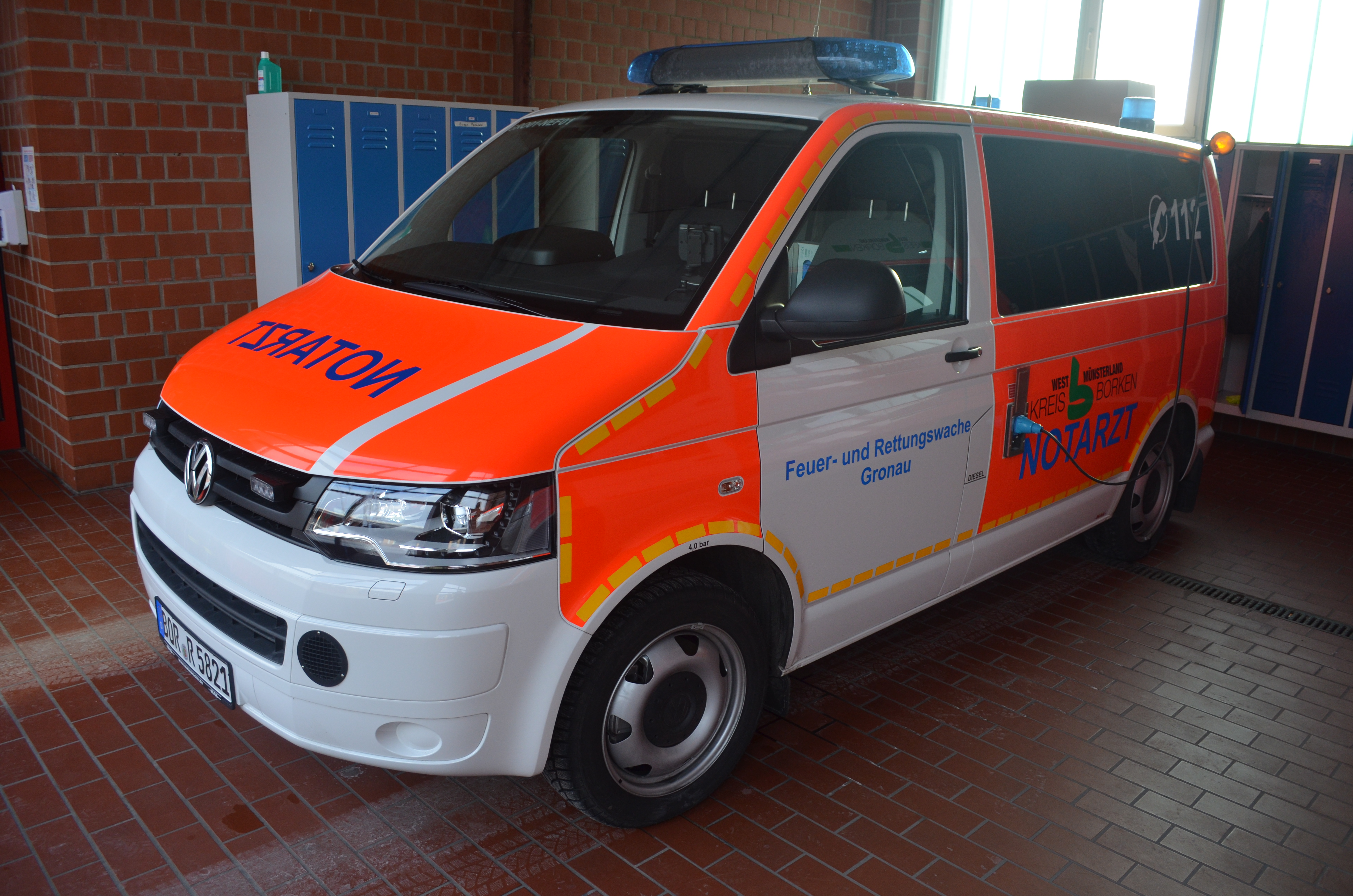 Neues Notartzfahrzeug von Gronau.